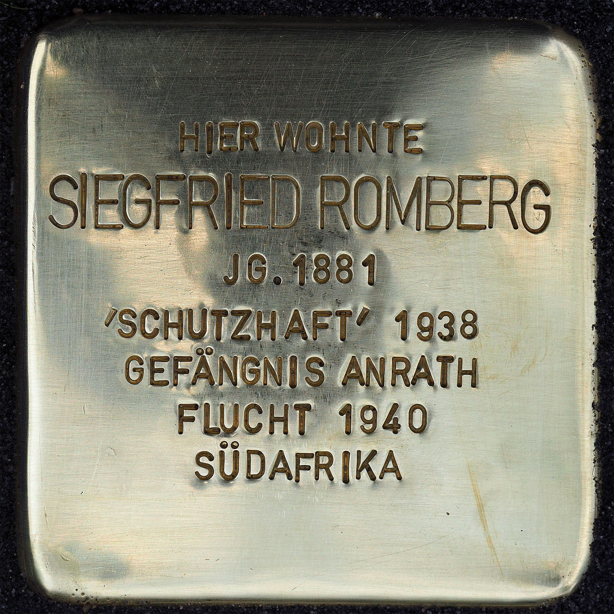 Stolpersteine in Tönisvorst: Siegfried Romberg